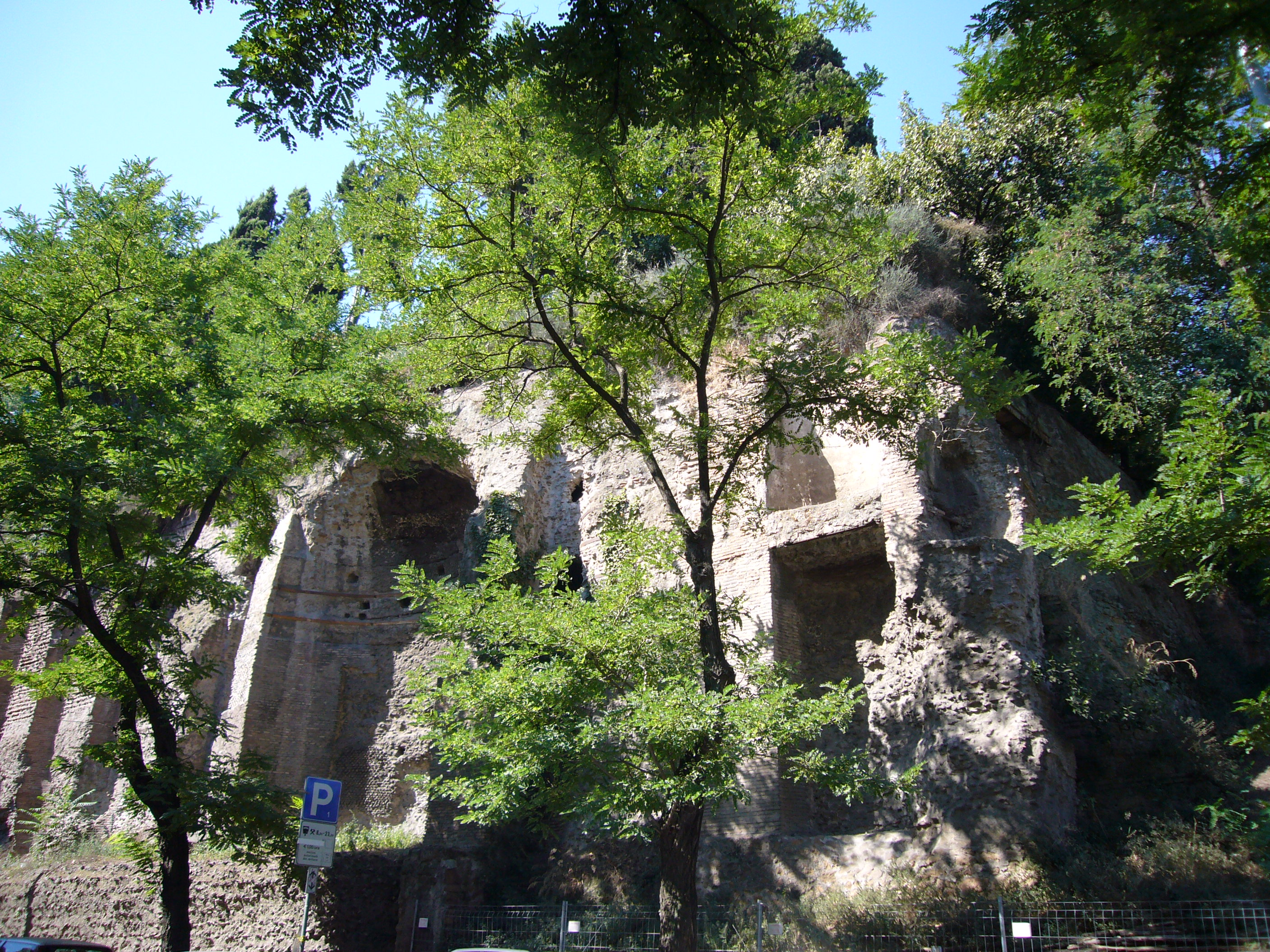 Soubassements du temple du Divin Claude et nymphée de Néron sur la via Claudia